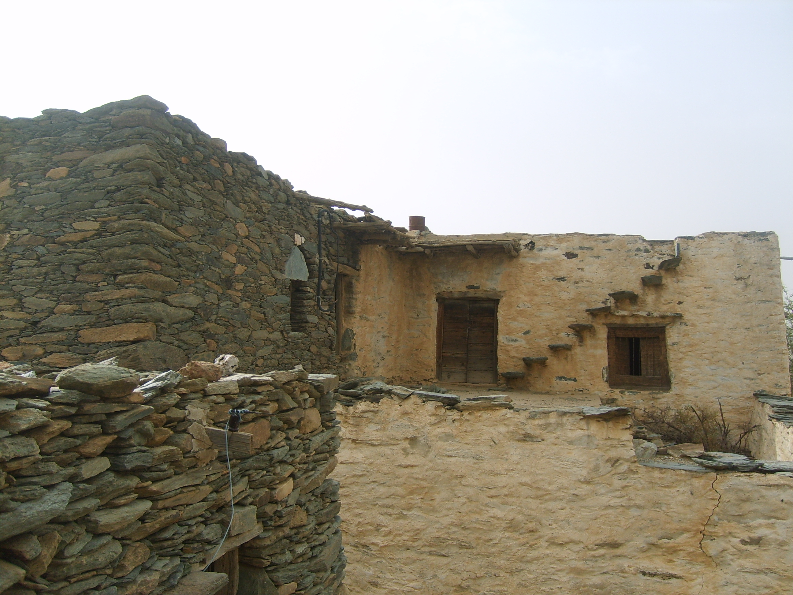 بعض البيوت الأثرية في الحكمان